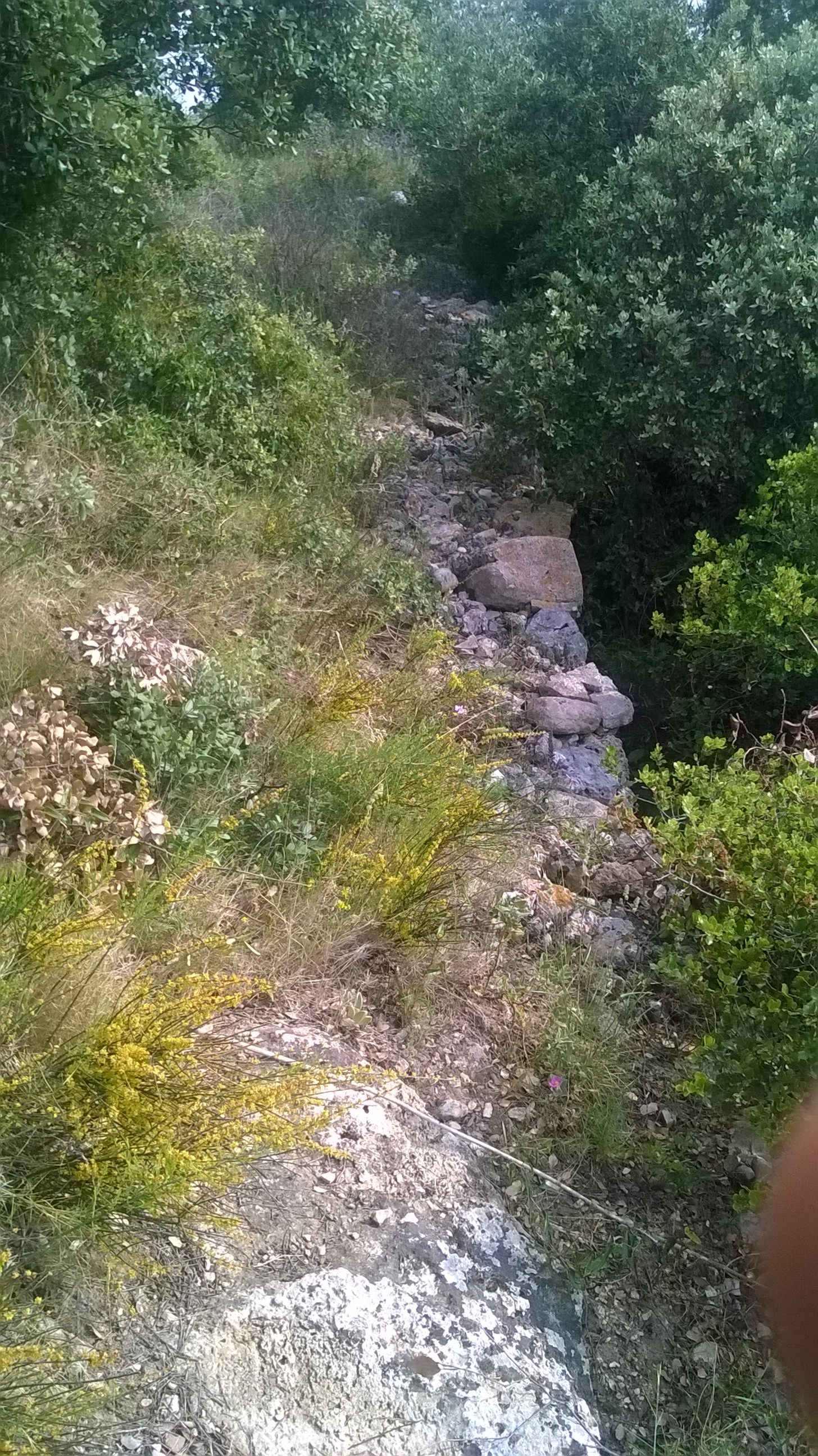 Prise par M. Thomy Mas